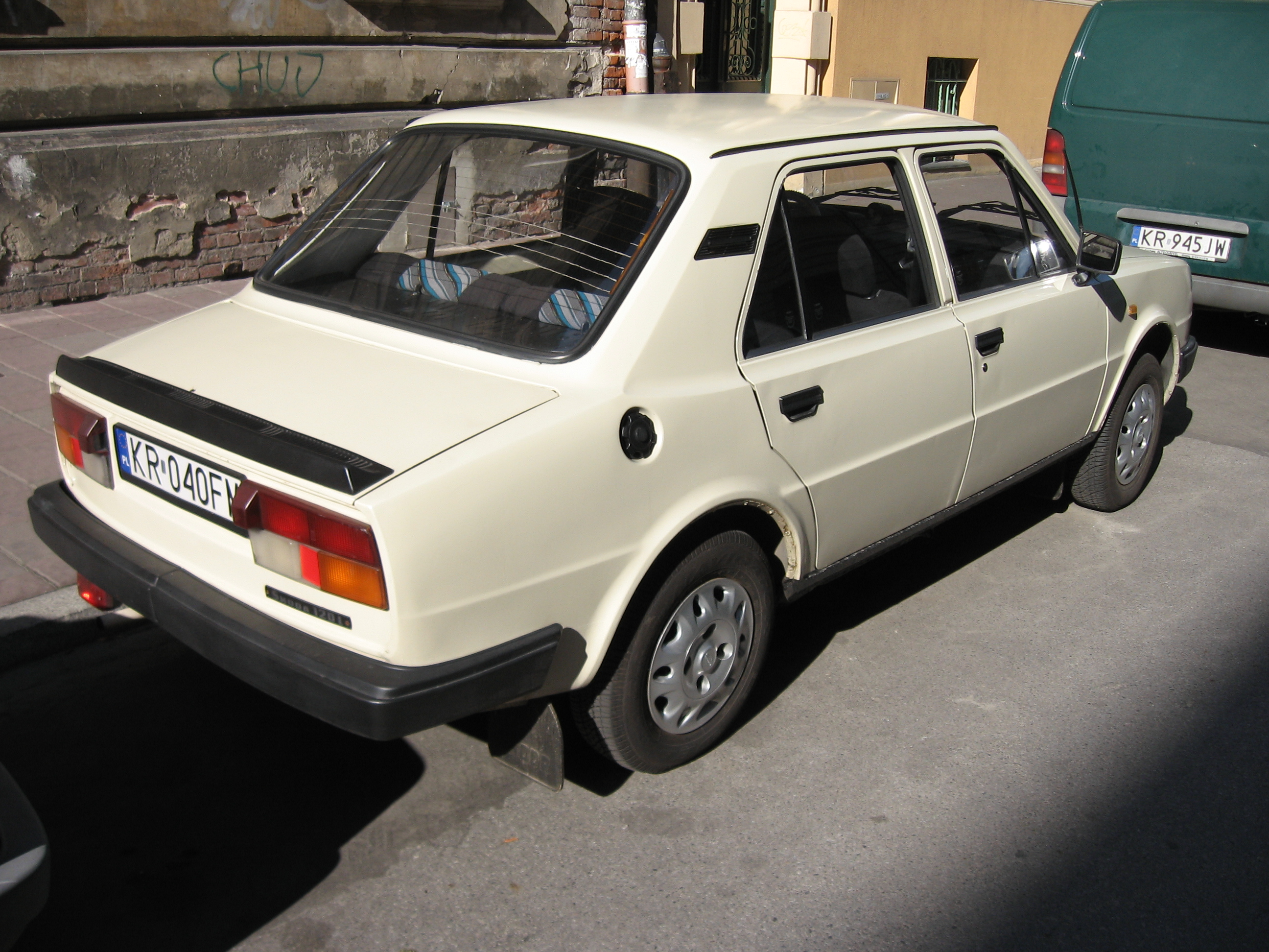 Škoda 120 L produced between 1984 and 1985 on Jabłonowskich street in Kraków.